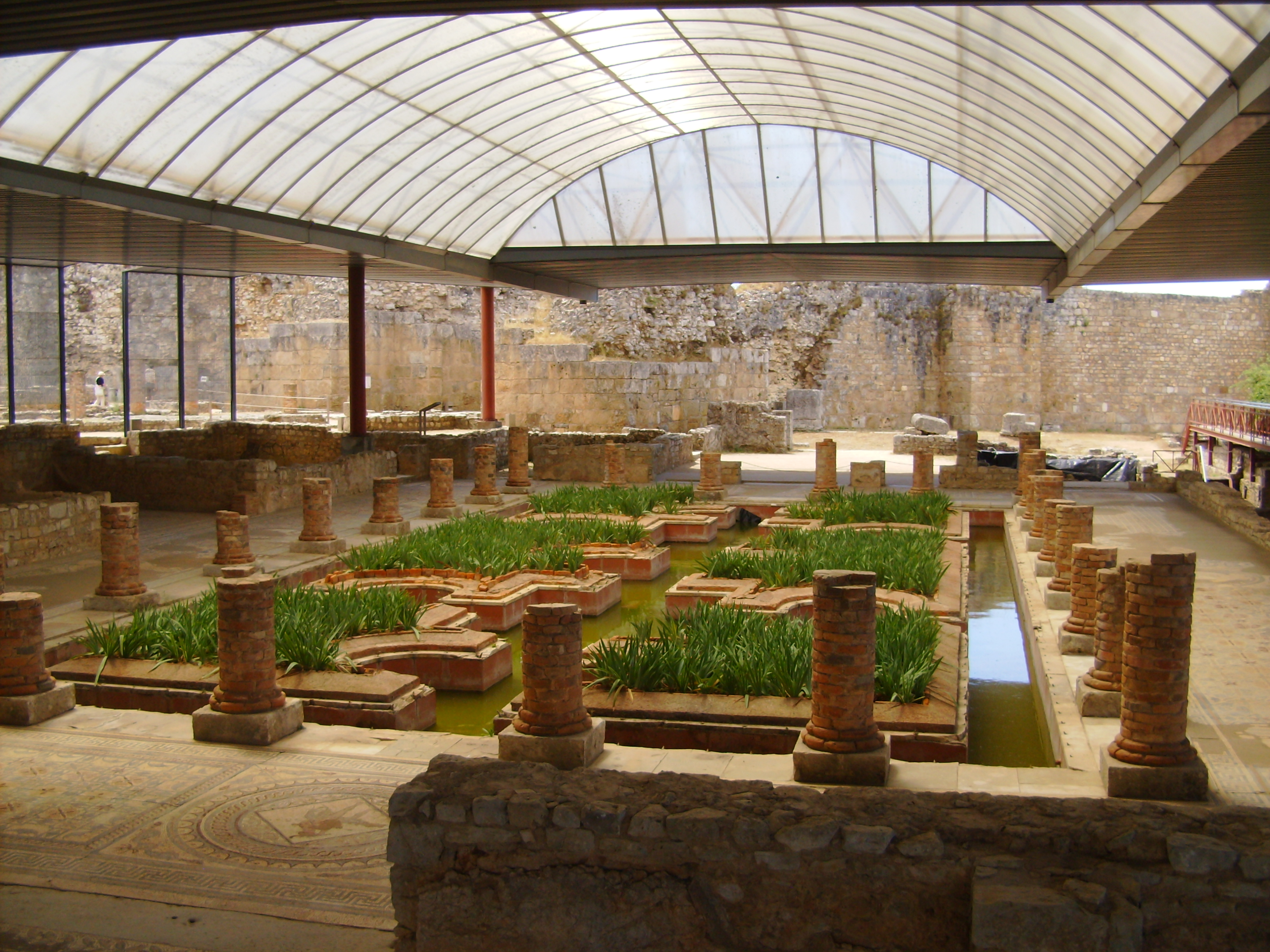 Conímbriga, distrito de Coimbra, Portugal: Casa dos Repuxos.